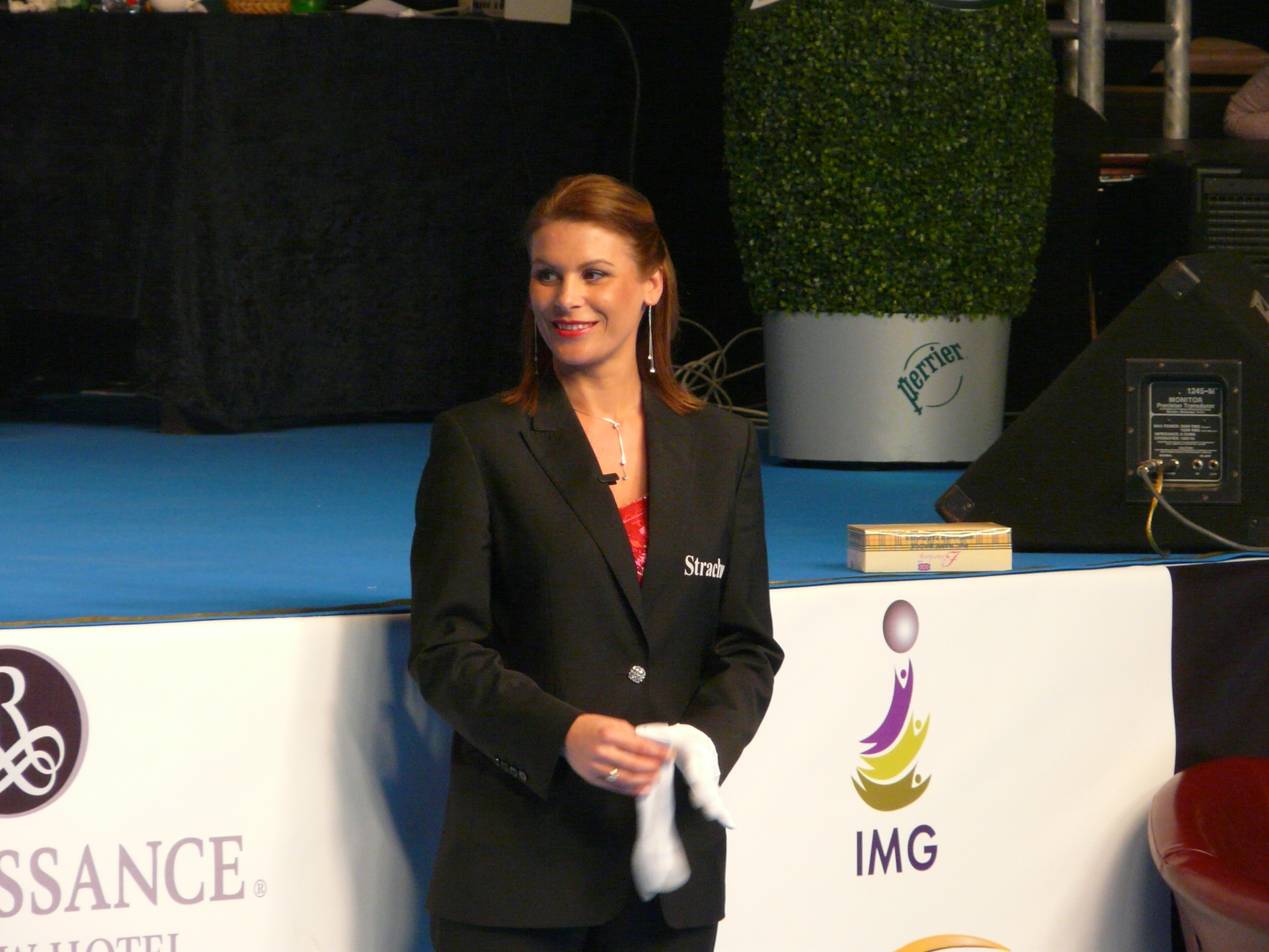 Туринир World Series of Snooker в Москве